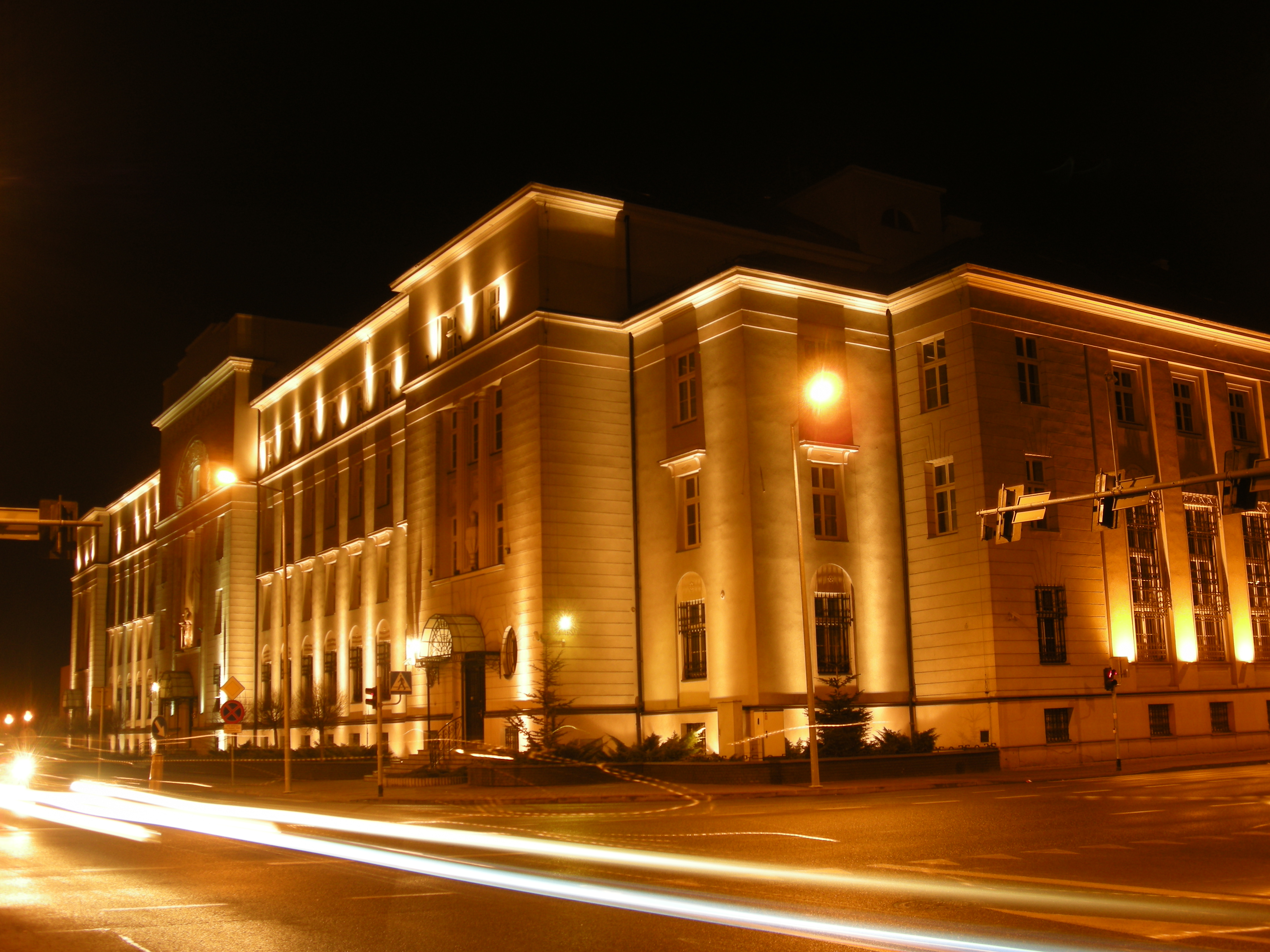 Budynek Sądu Okręgowego przy ul. J. Dąbrowskiego